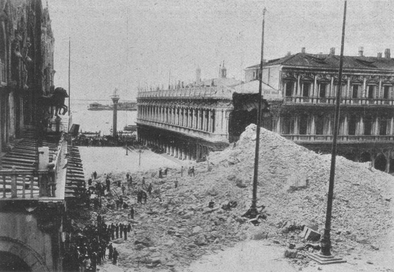 Die Trümmer des Markusturms in Venedig nach dessen Zusammensturz am 14. Juli 1902.